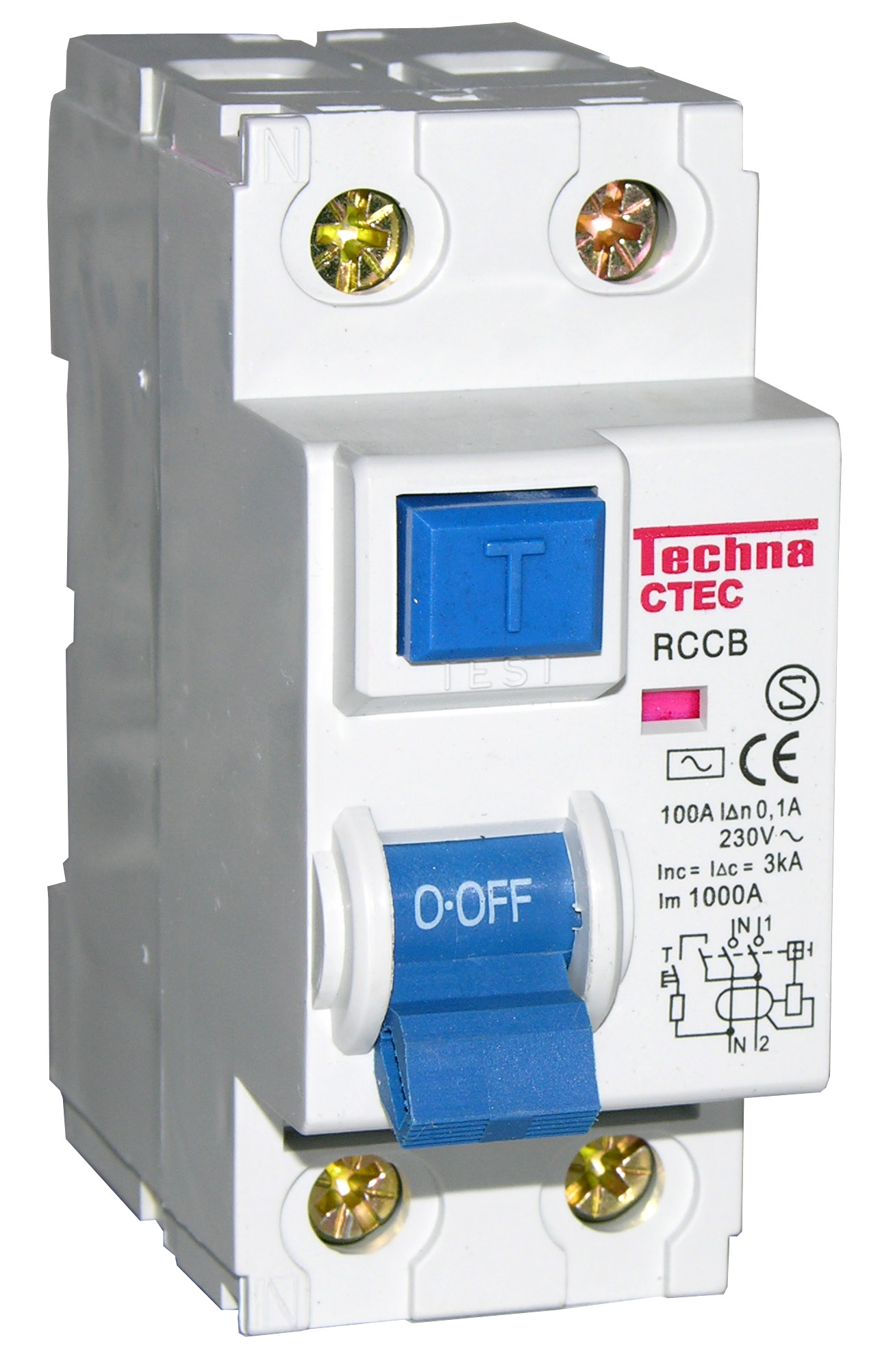 Residual current device 2pole 100A